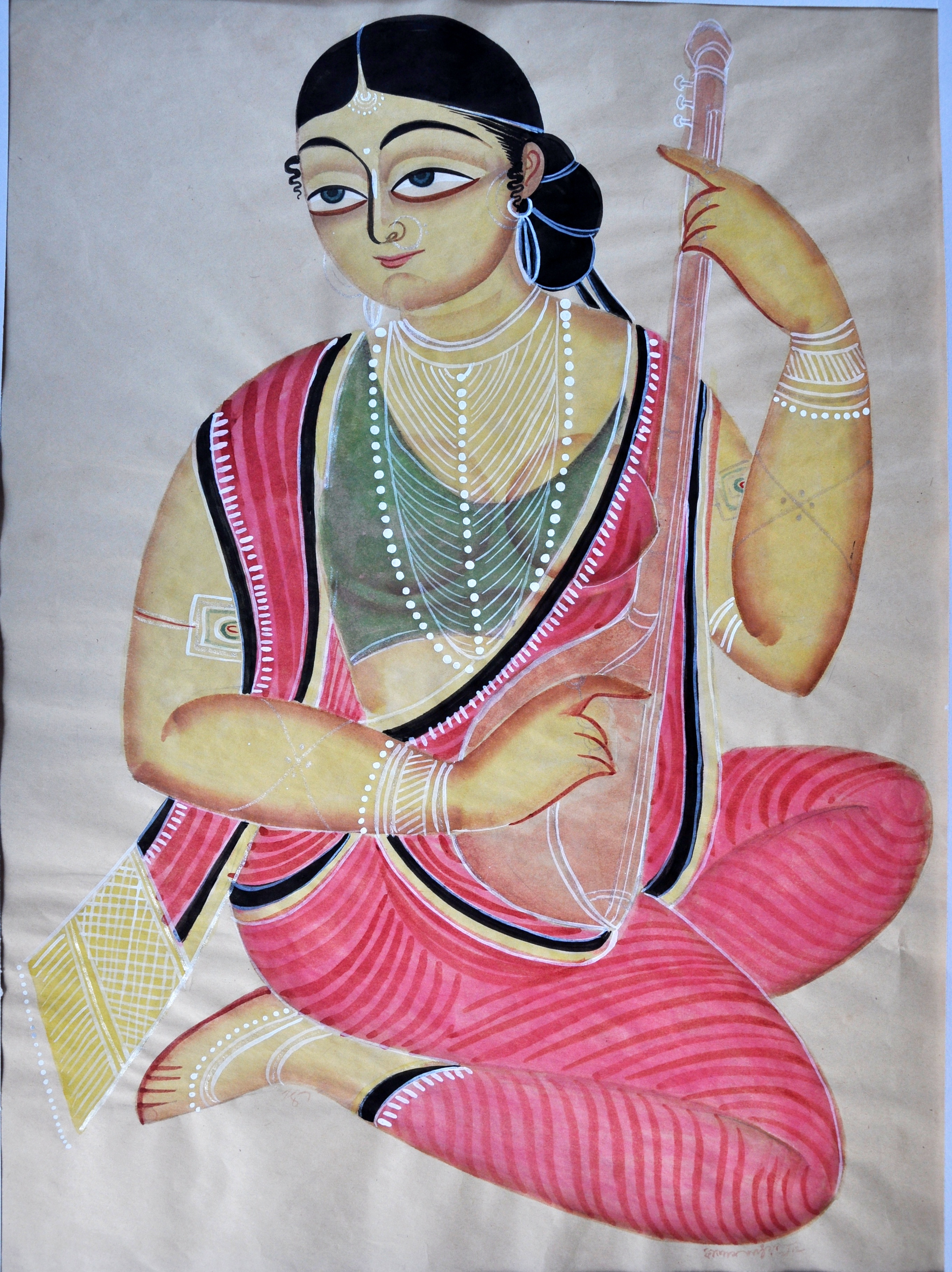 सितार बजाती स्त्री, कालीघाट चित्र, चित्रकार- कलाम पटुवा